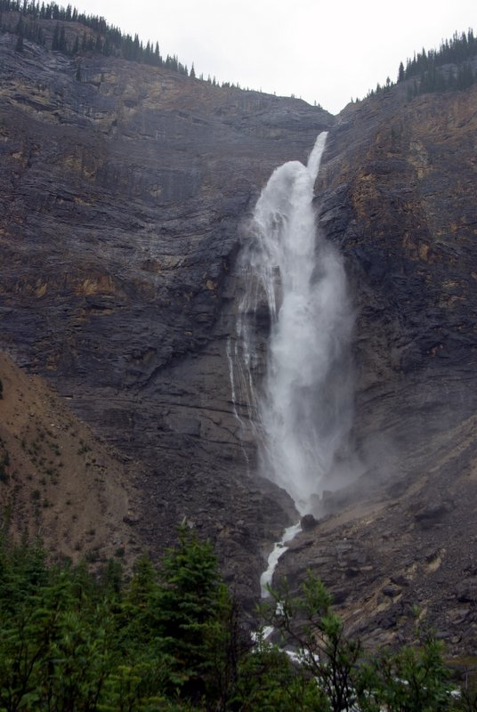 Takakkaw Falls, Yoho NP, B.C., Canada